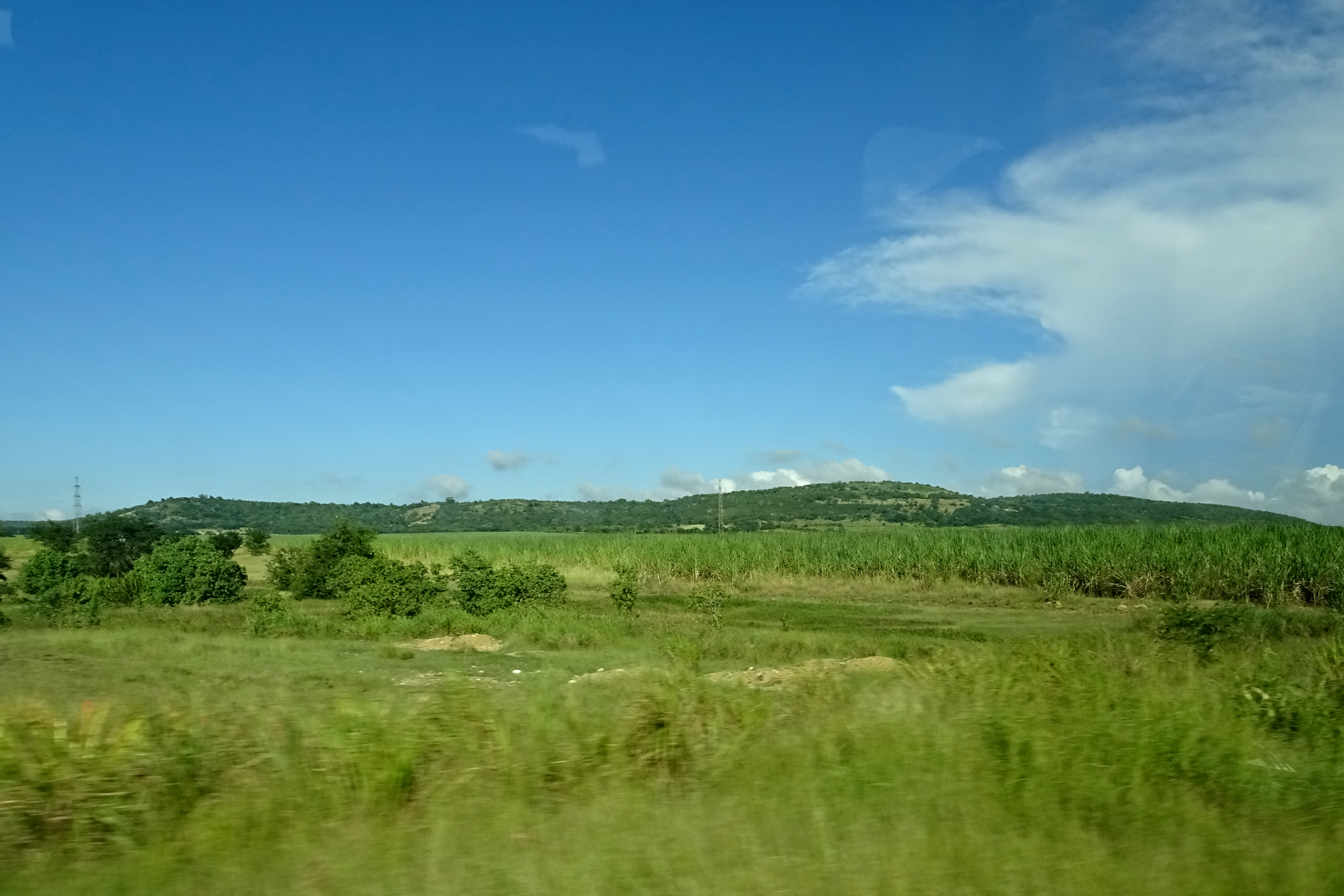 Near Marcané, Cueto, Holguin Province, Cuba